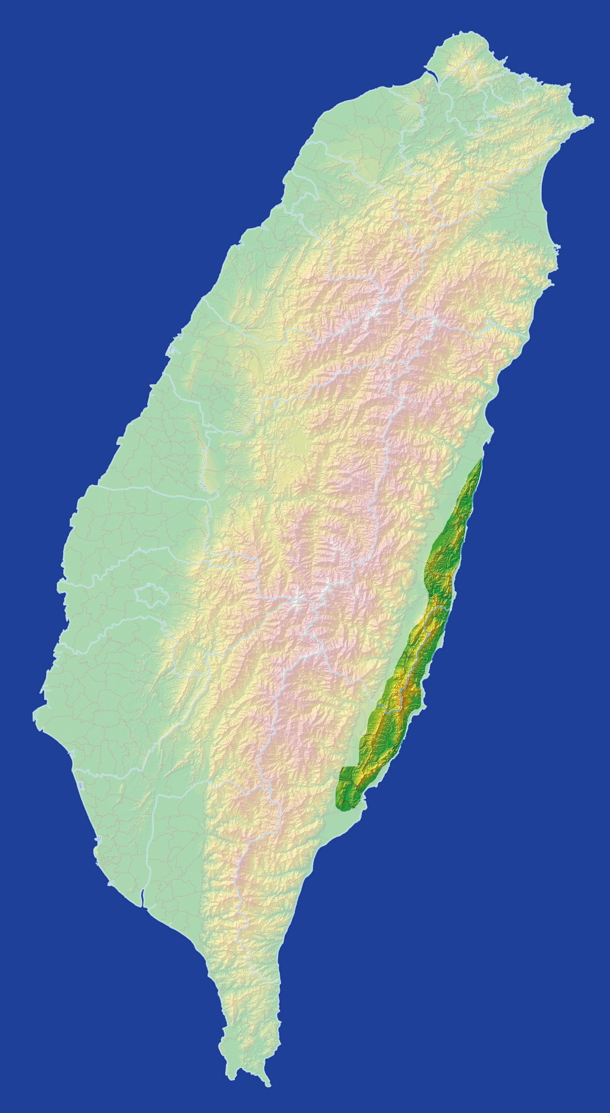 Map of Haian Range, Taiwan